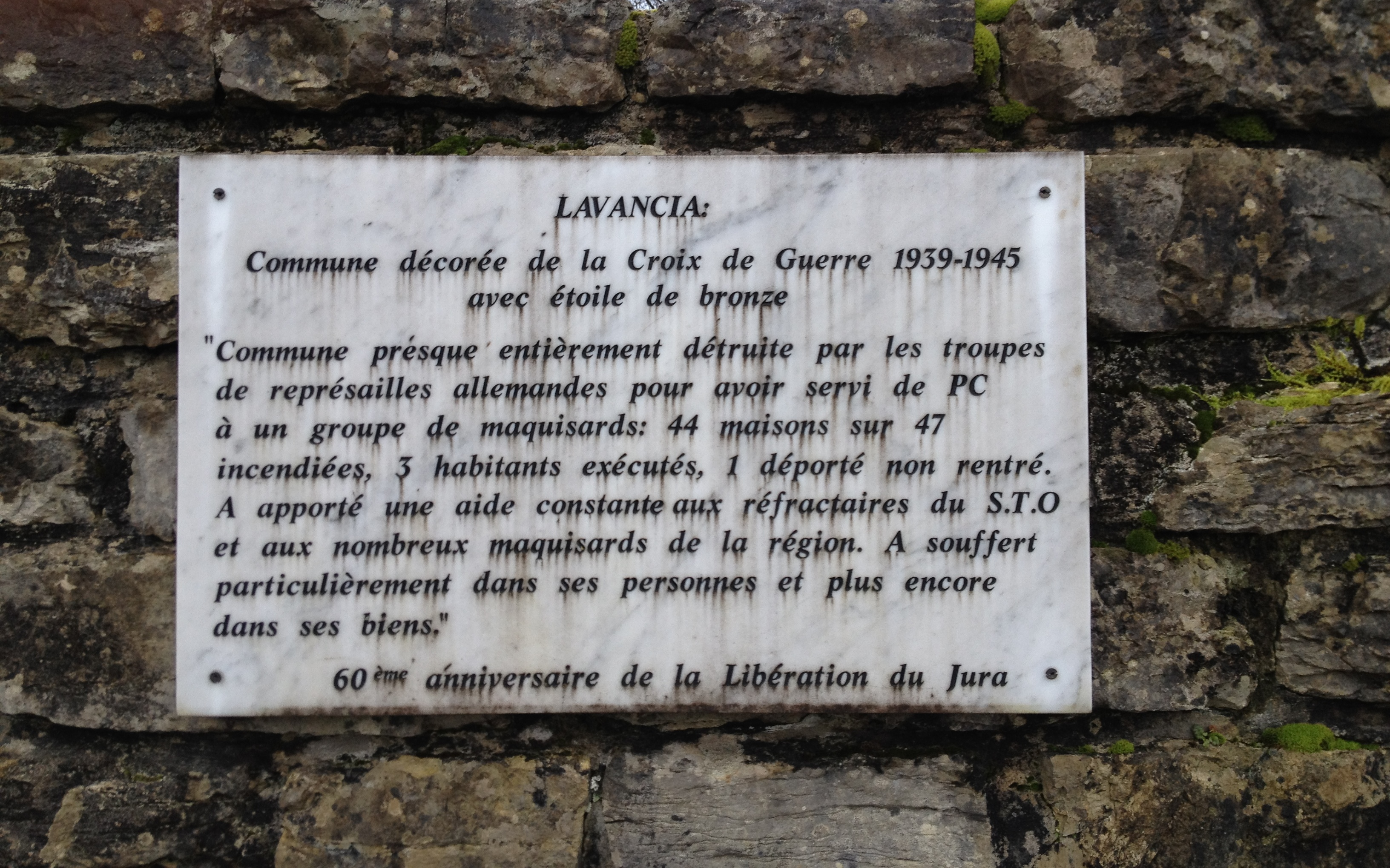 Plaque à Lavancia ; village martyr.